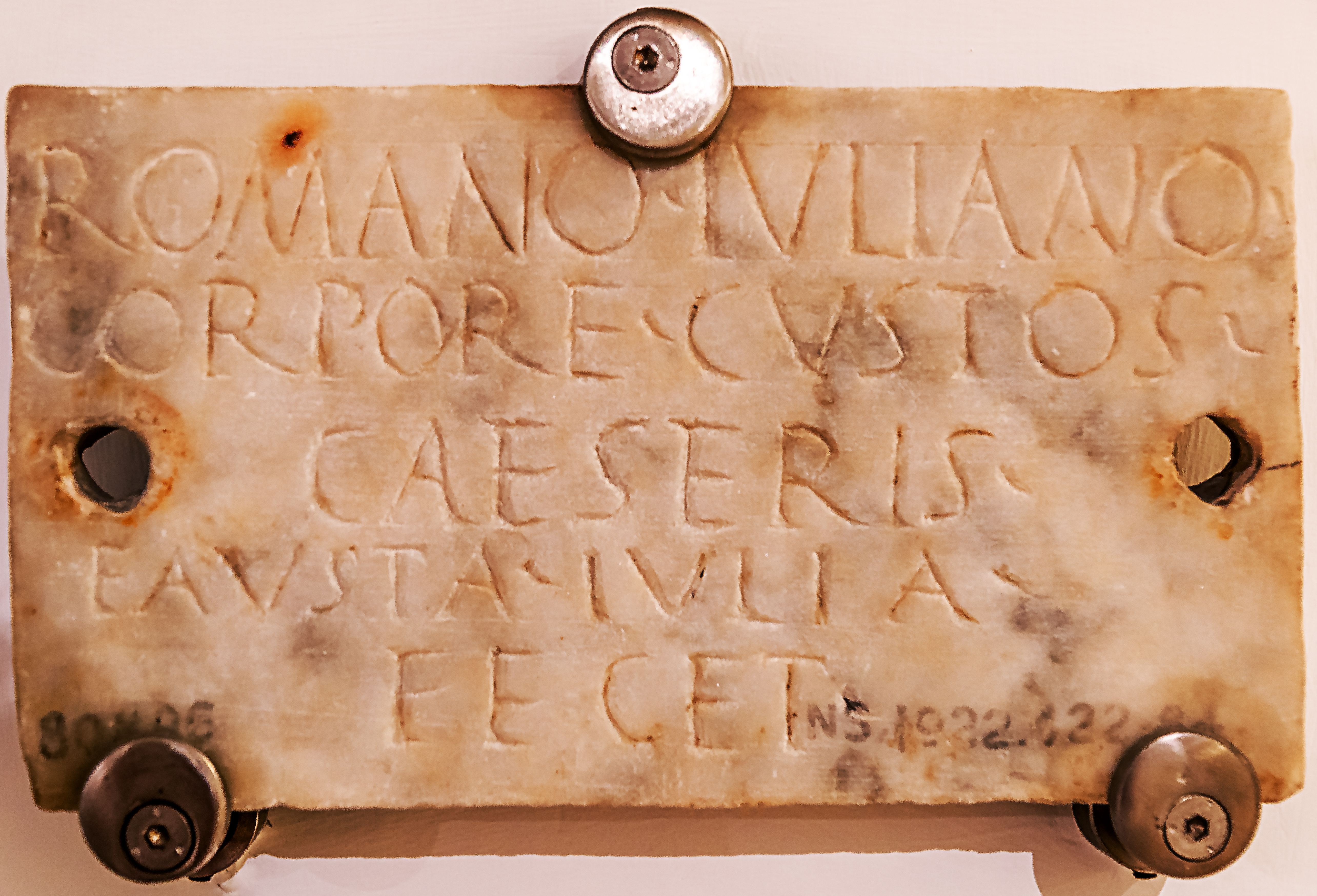 Grabinschrift (titulus) aus Marmor für den germanischen kaiserlichen Leibwächter Romanus Iulianus, der von seiner römischen Witwe Fausta Iulia an der Via Portuensis in Rom im 1. Jahrhundert gesetzt worden war. Ausgestellt im Museo Nazionale Romano, Rom, Italien, Museo Epigrafico. unter der Inv.-Nr. 80896